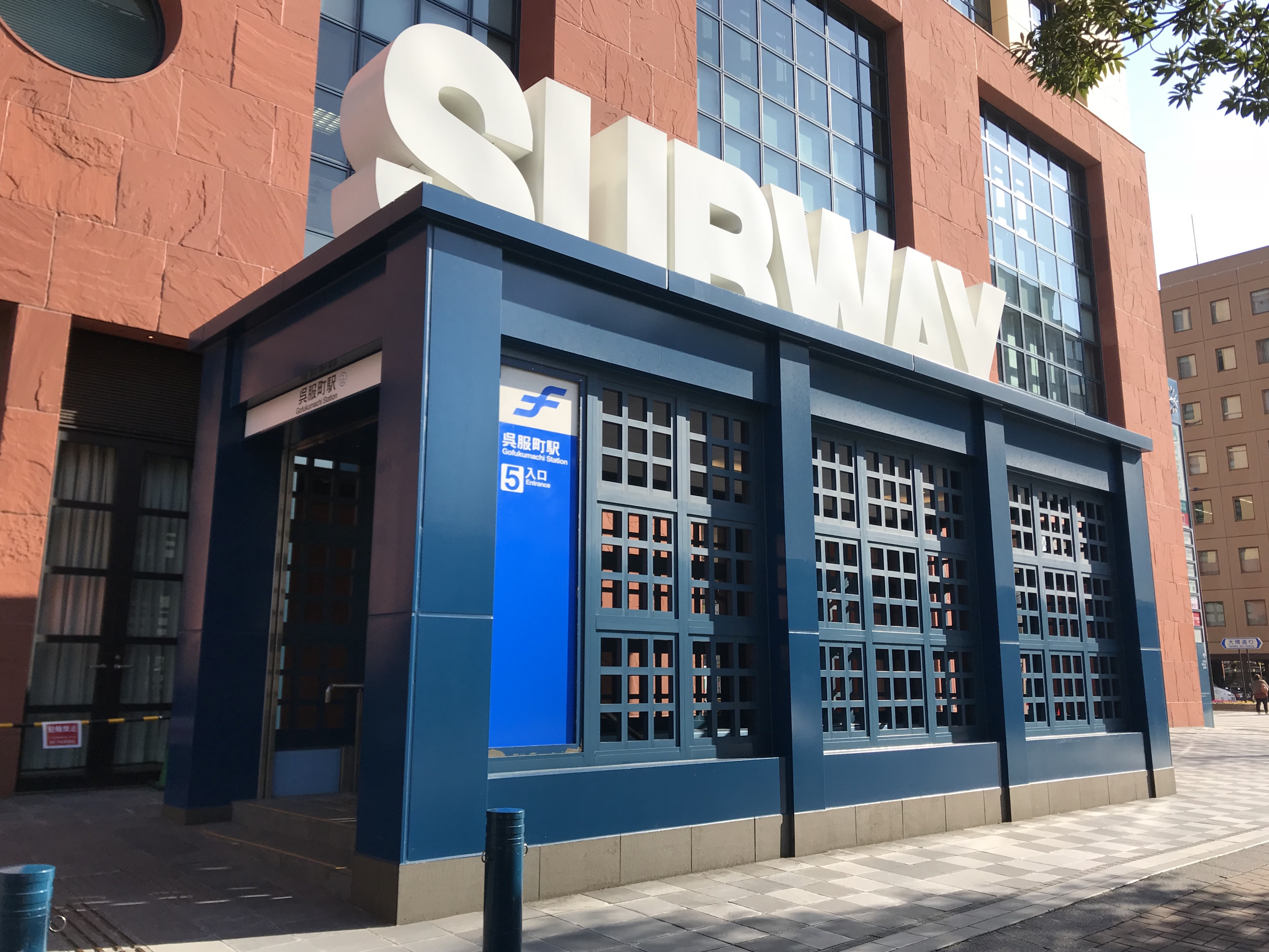 呉服町駅の5番出入り口